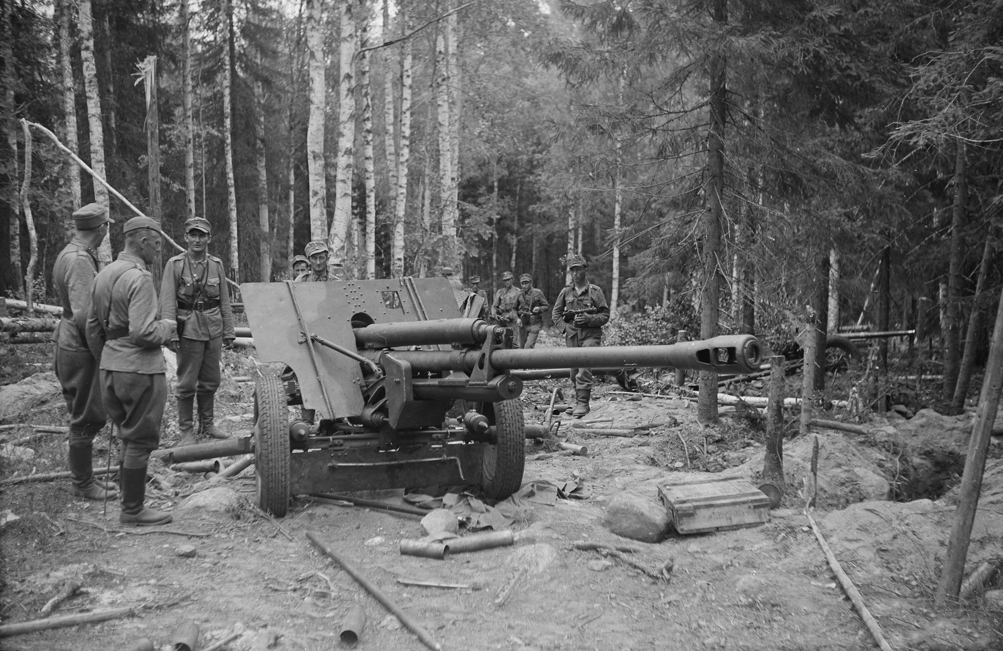 Финские солдаты осматривают брошенную советскую технику. На передним плане - артиллерийское орудие ЗИС-3. Район Иломантси, 7 августа 1944 г.